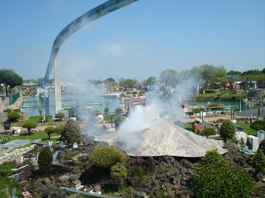 Italie en miniature (Rimini)- reproduction du volcan Etna de Sicile